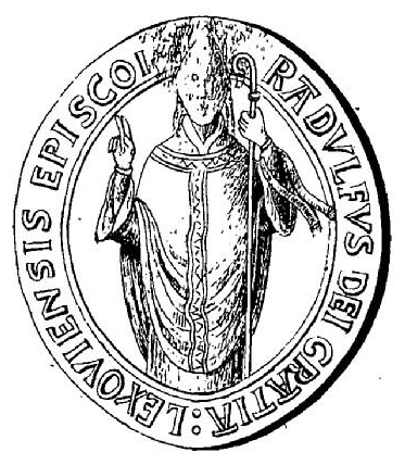 Sceau de Raoul de Varneville.